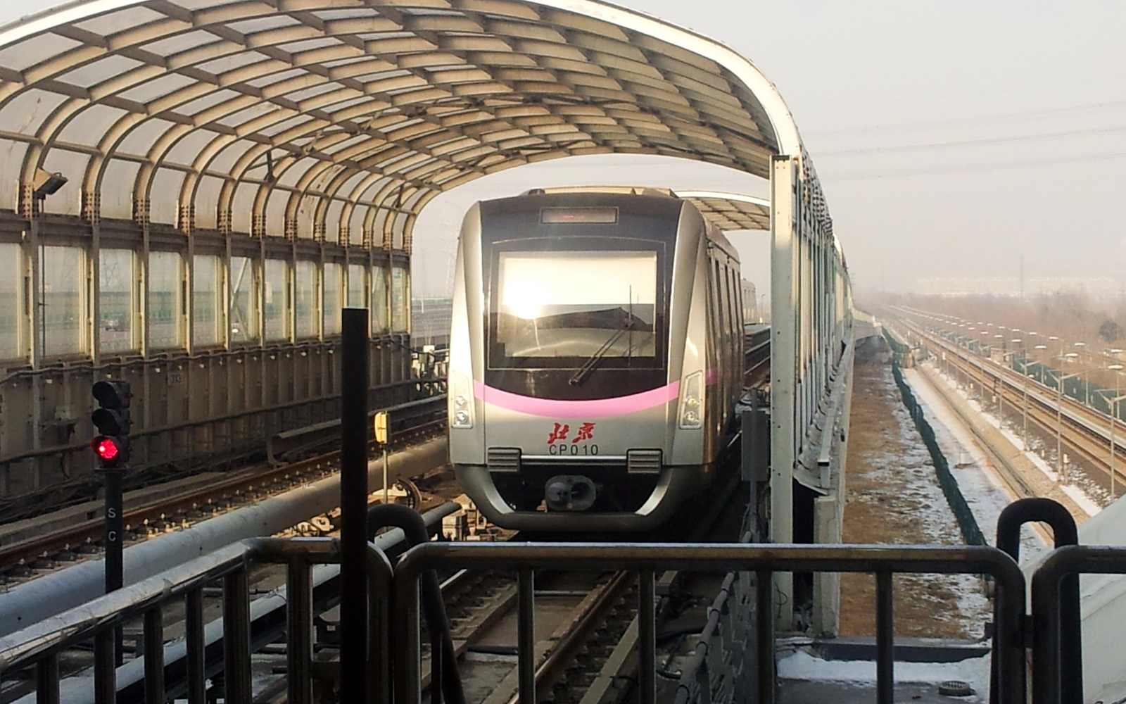 北京地铁昌平线列车驶抵西二旗站